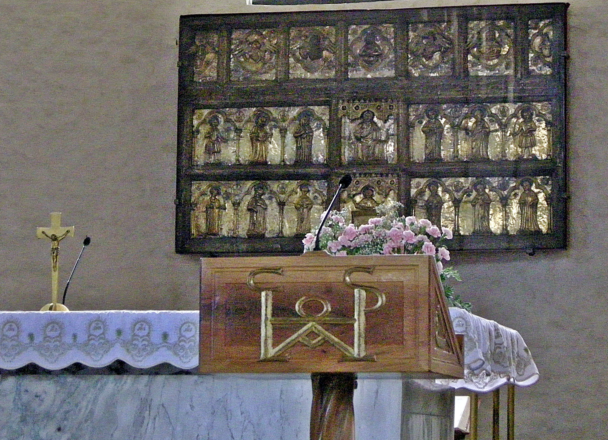 Grado, basilica di sant'eufemia, interno, pala